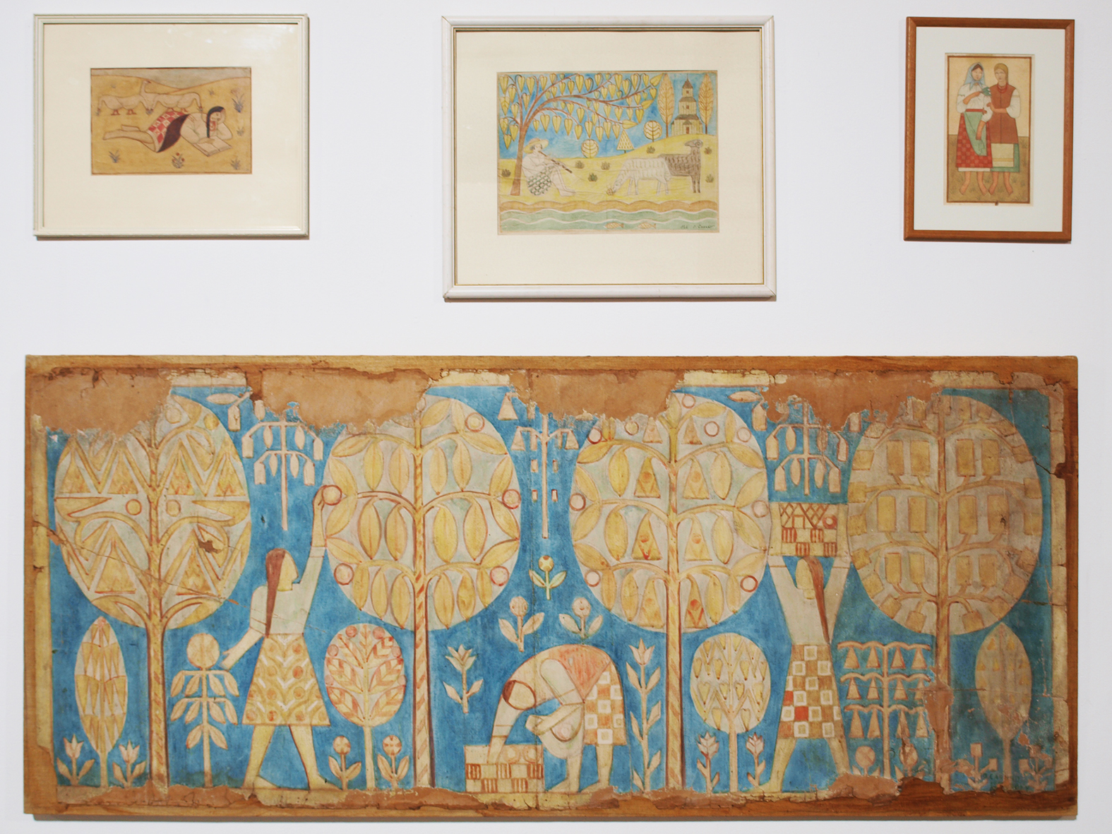 Митецький Арсенал. Бойчукізм. Проект «великого стилю» 2017 рік. Зліва вгорі: Олександр Саєнко. «Пасе гусей», 1926. Папір, акварель. Приватна колекція. Посередині вгорі: Олександр Саєнко. «Вівчар», 1922. Папір, акварель. Приватна колекція. Справа вгорі: Марія Юнак «Дві дівчини», 1921. Папір, акварель, олівець. Національний художній музей України Внизу: Олександр Саєнко. «Збирання врожаю», 1920. Картон, темпера. Приватна колекція.